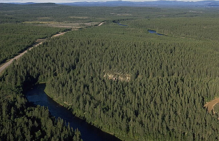 Motiv: Hamre skans Nyckelord: Flygbilder, Riksintressen Kategori: SkansHamre skans